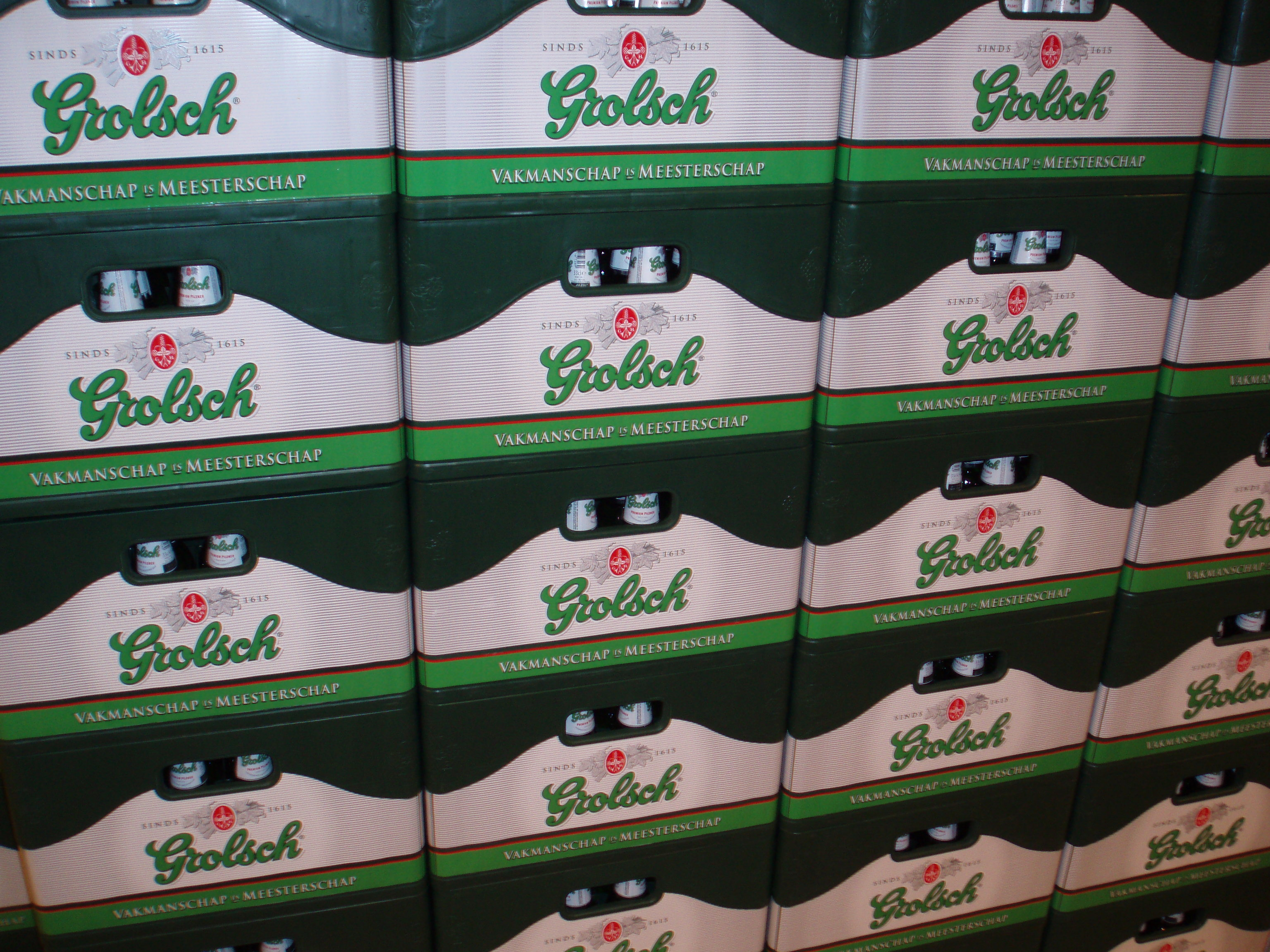 Bakken bier van het merk Grolsch in de Albert Heijn in Diezerpoort te Zwolle.